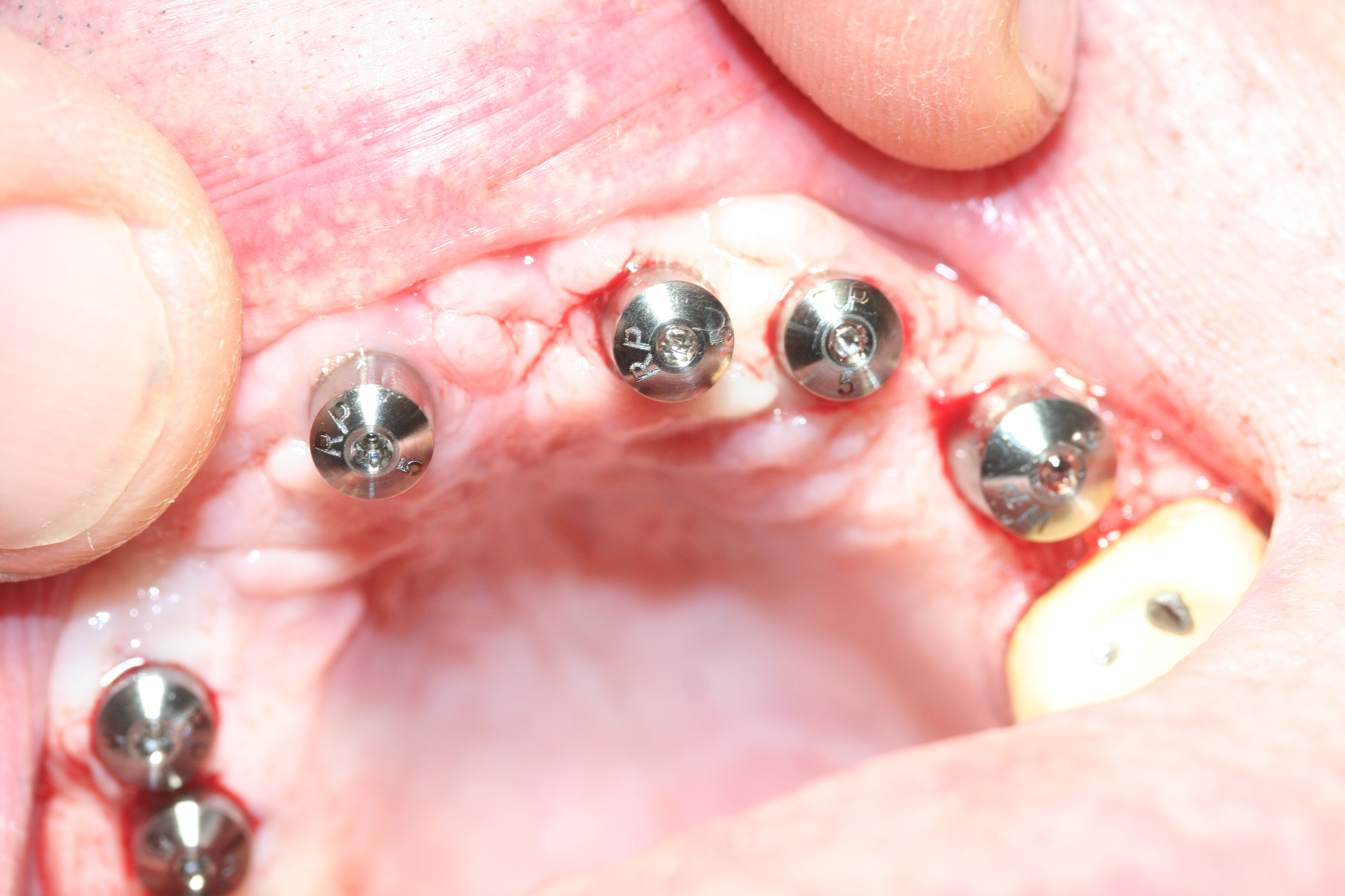 bridge sur implants, implants et vis de cicatrisation en place